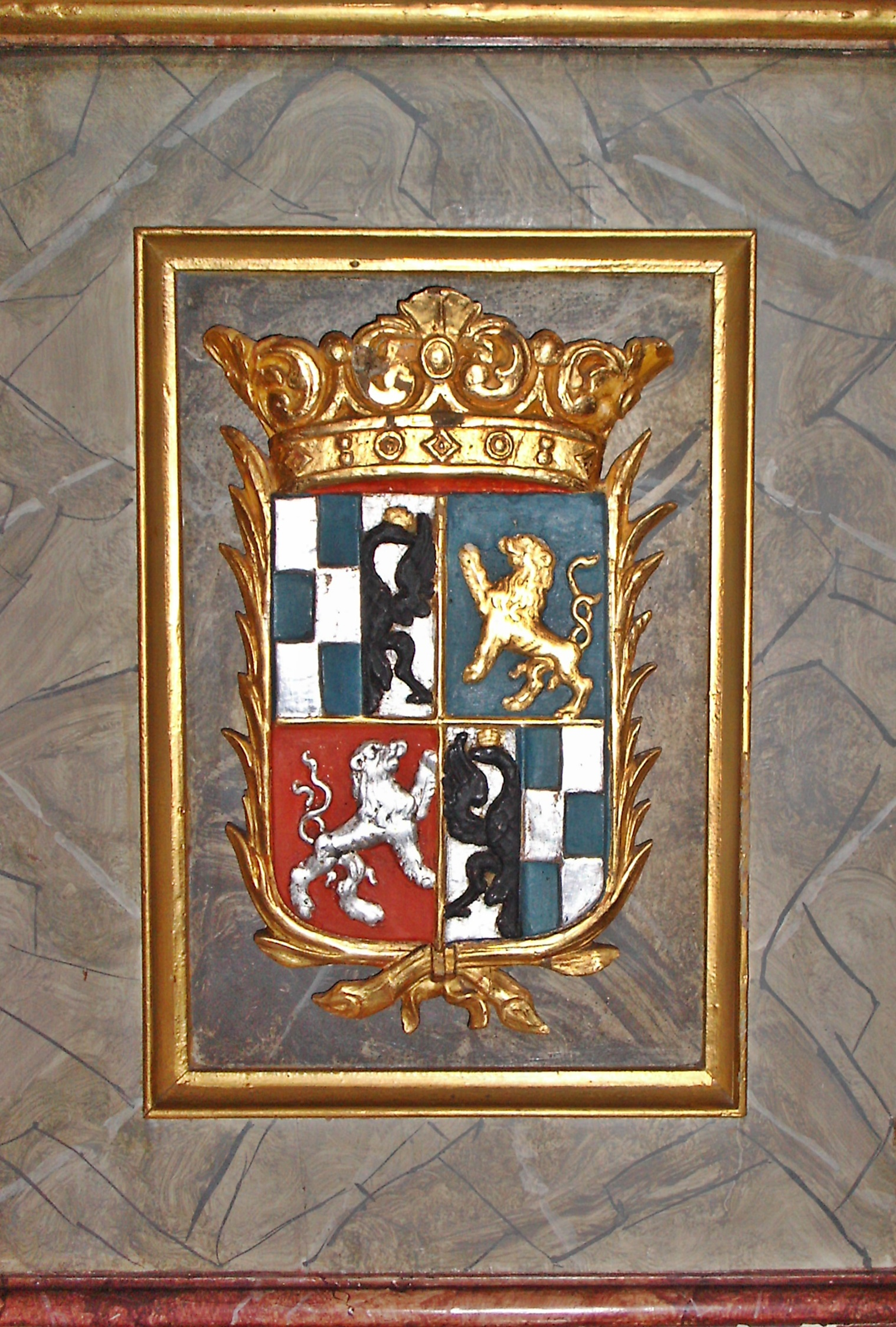 Quirnheim-Boßweiler, Rheinland-Pfalz, kath. Pfarrkirche St. Oswald. Stifterwappen der Fam. Merz von Quirnheim, am barocken Hochaltar